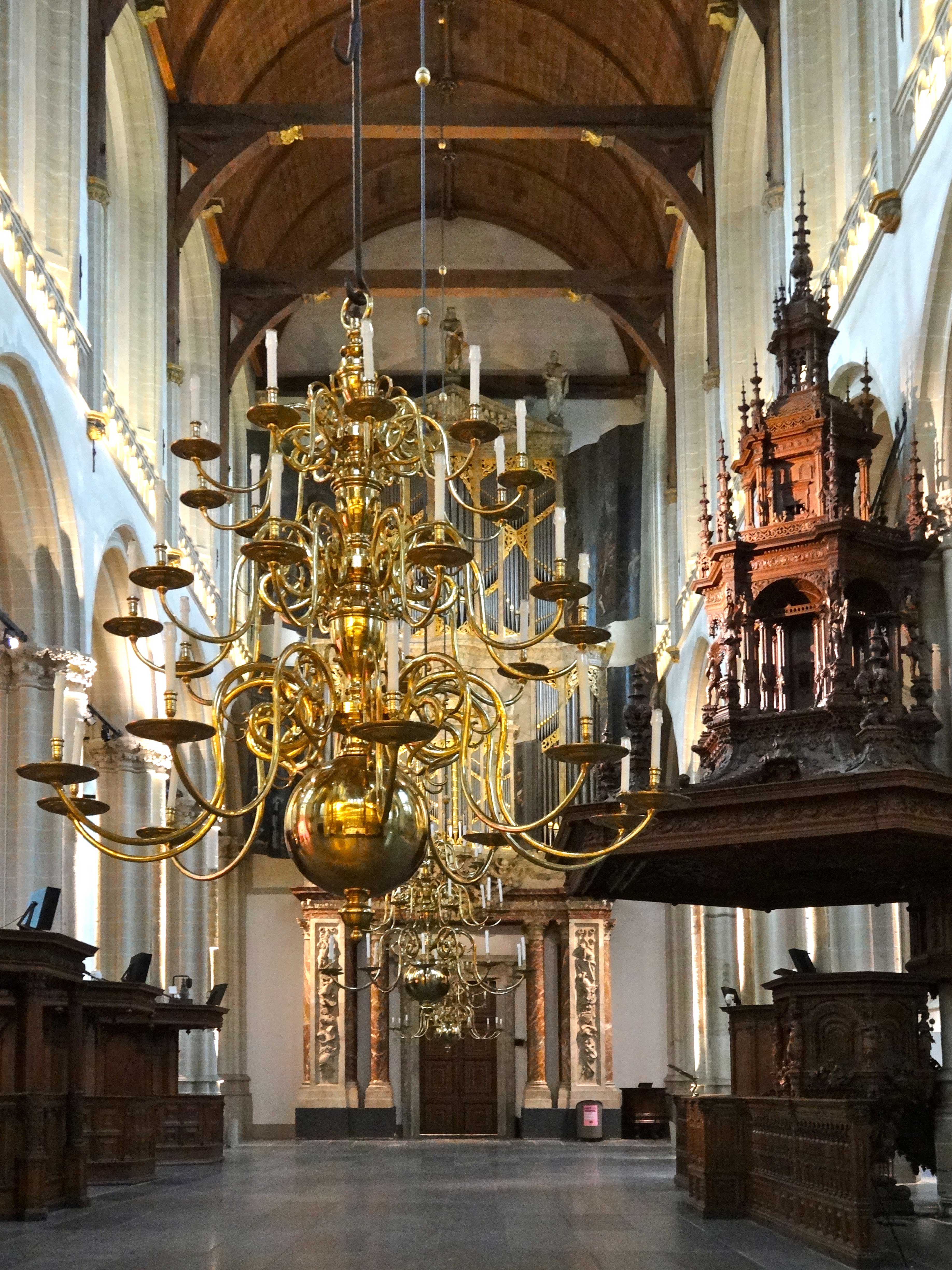 Nieuwe Kerk Amsterdam (interieur)